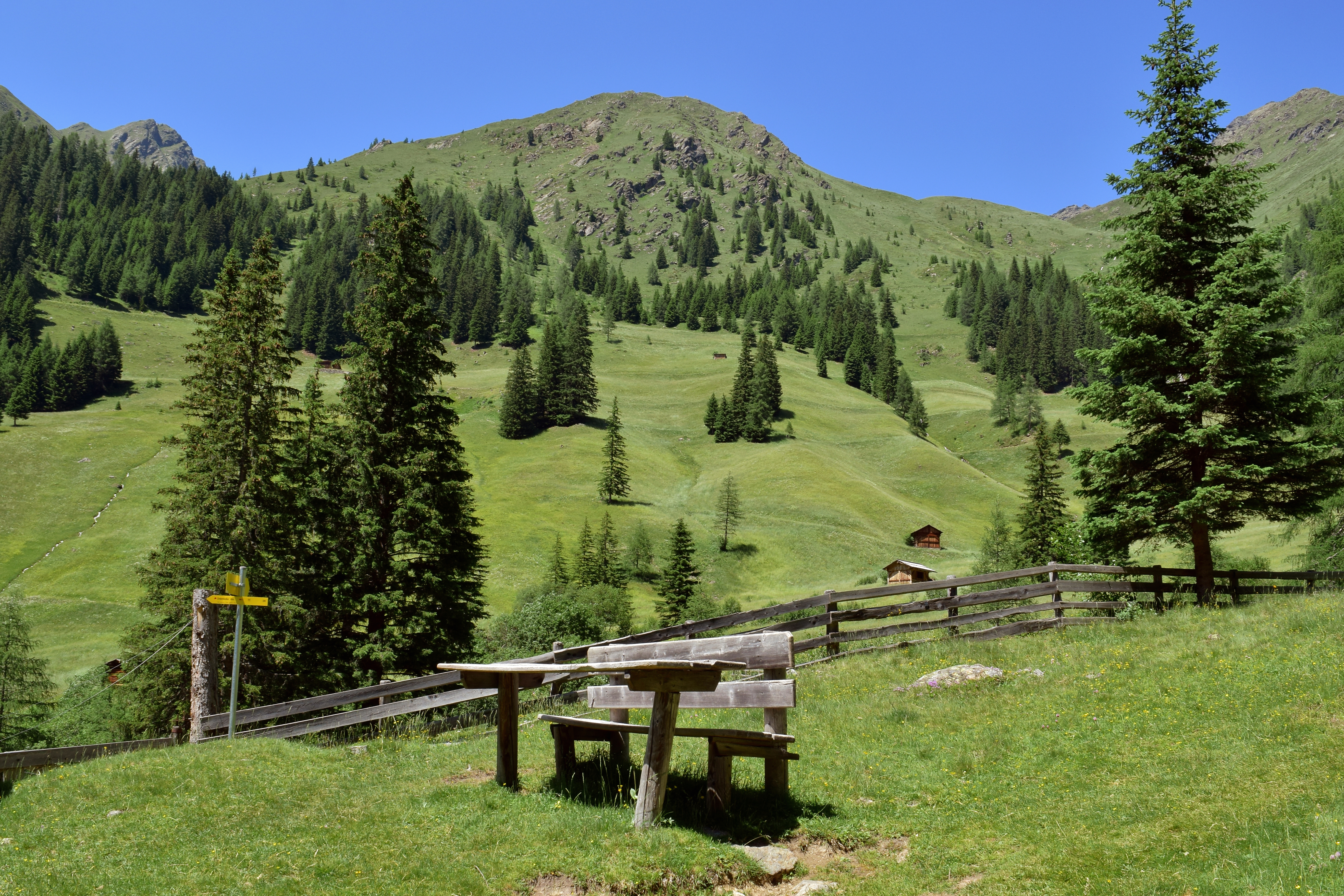 Rastplatz am Weg zwischen Ober- und Unterstalleralm